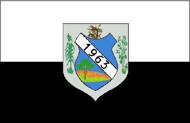 Bandeira do Município de Ingazeira